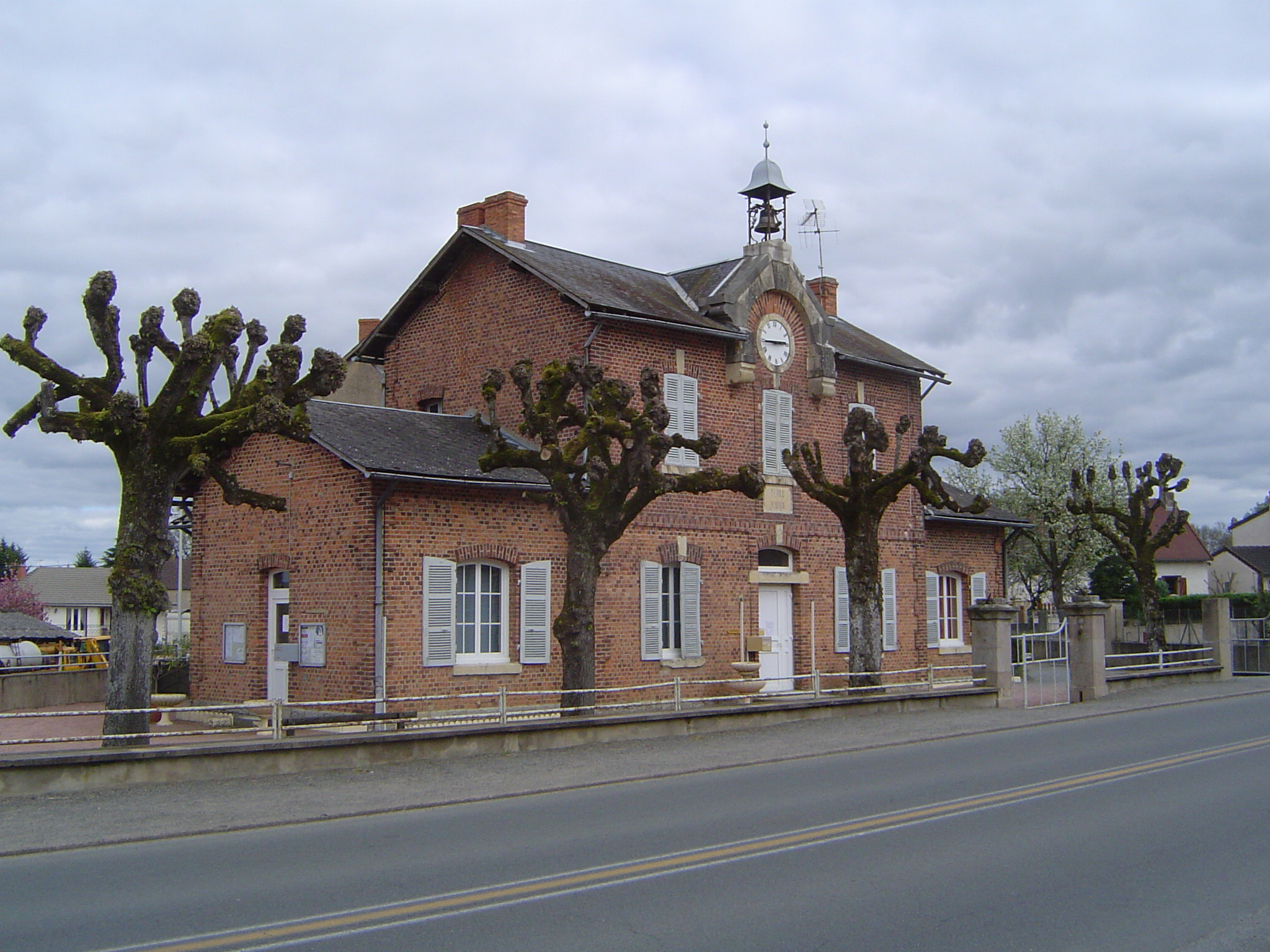 Vitry-sur-Loire (mairie)